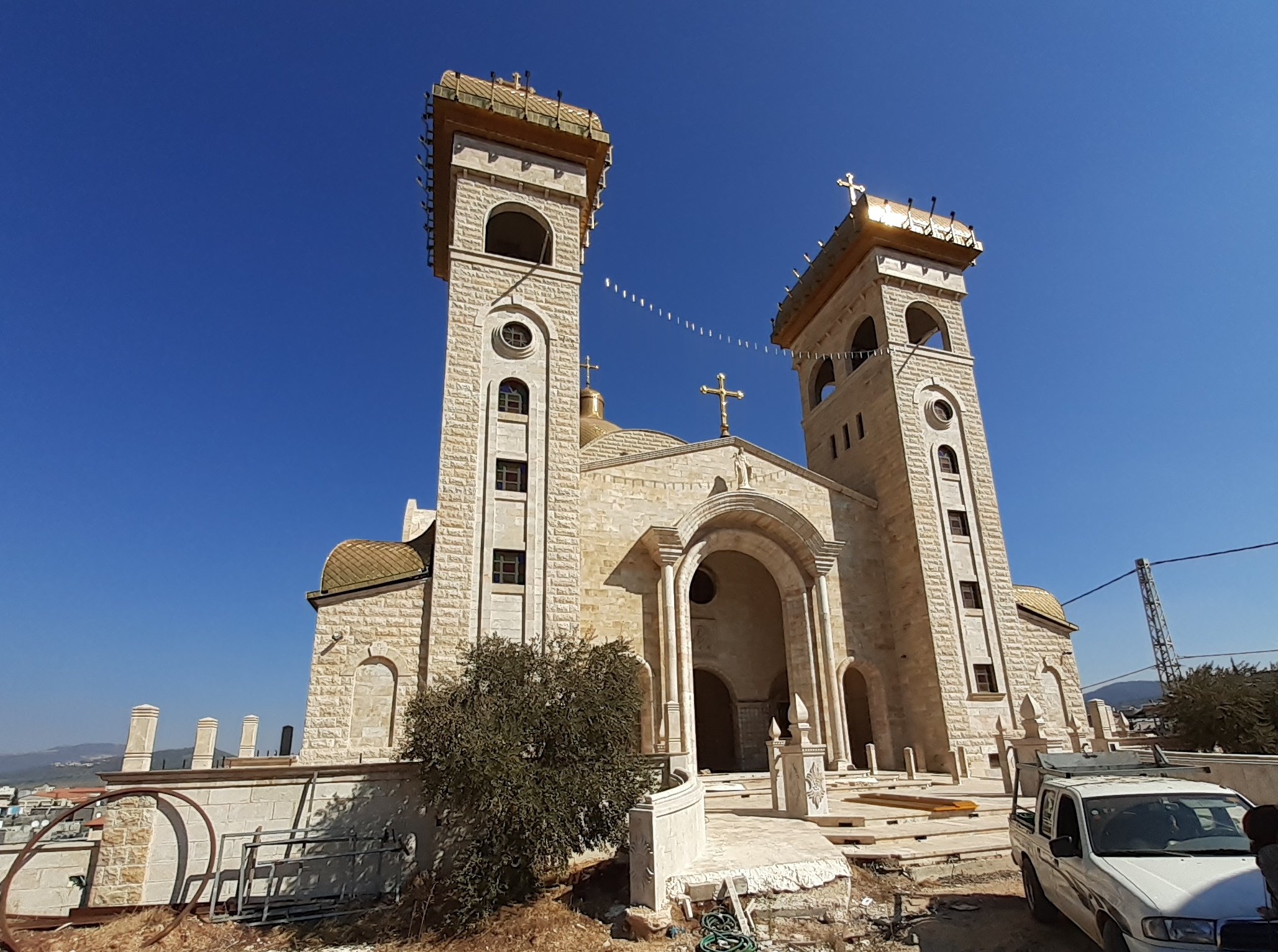 Die Liebfrauenkirche in Sachnin, seit 2003 im Bau, Januar 2017 metallene Turmhauben aufgesetzt, 2012 Unterkirche als Gemeindesaal eröffnet. Blick von Westen.